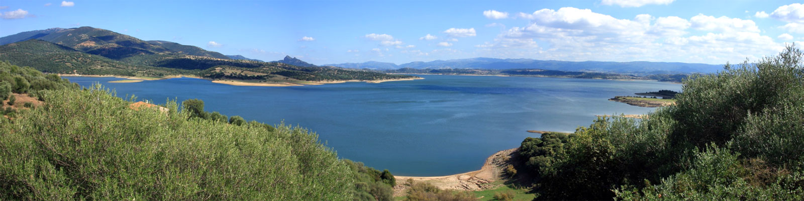 Panoramica del Lago Coghinas, Sardegna